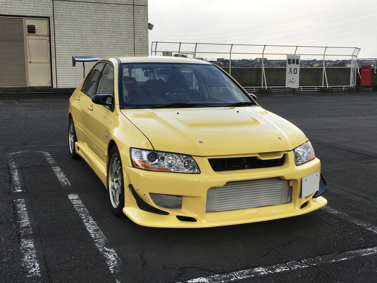 CT9A ランサーエボリューション7 GSR 頭文字D 小早川仕様